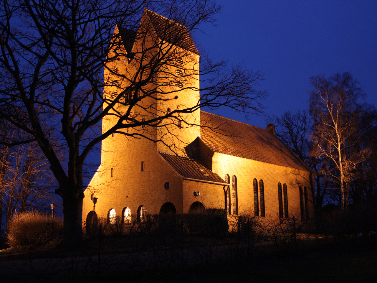 Dorfkirche Göhren März 2010